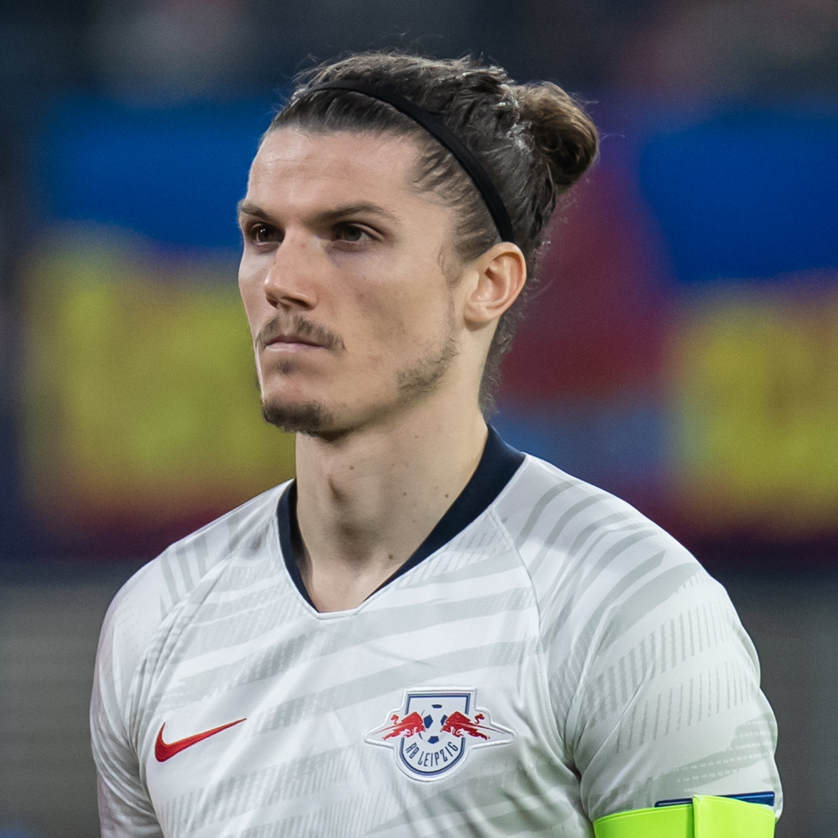 Fußball, Männer, UEFA Champions League Achtelfinale, RB Leipzig - Tottenham Hotspur; Marcel Sabitzer (RB Leipzig, 7)